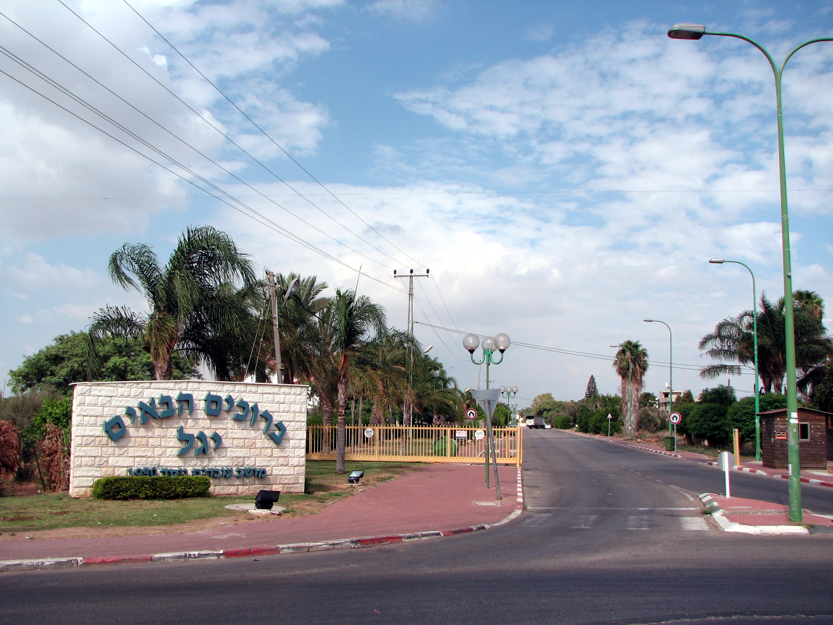 הכניסה למושב יגל